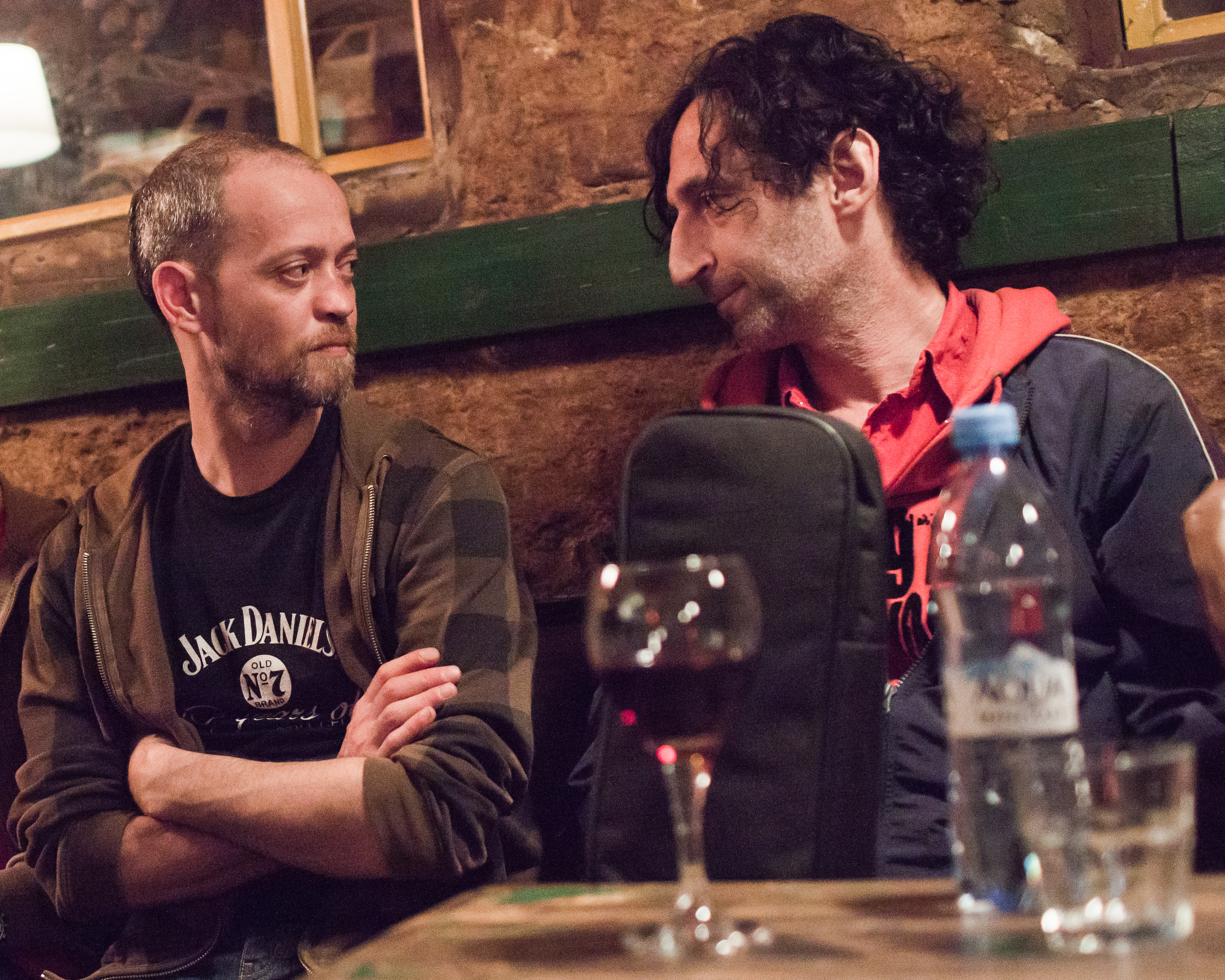 Приняли участие музыканты групп "Крузенштерн и Пароход", "Бром", "Метро", "ByZero". Сюрпризом стало появление Леонида Сойбельмана.